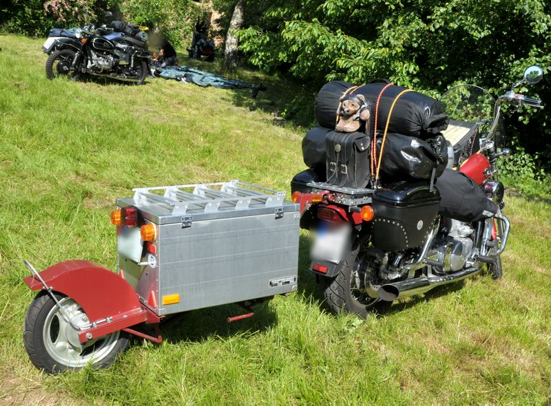 Einspuranhänger mit Kreuzgelenkkupplung